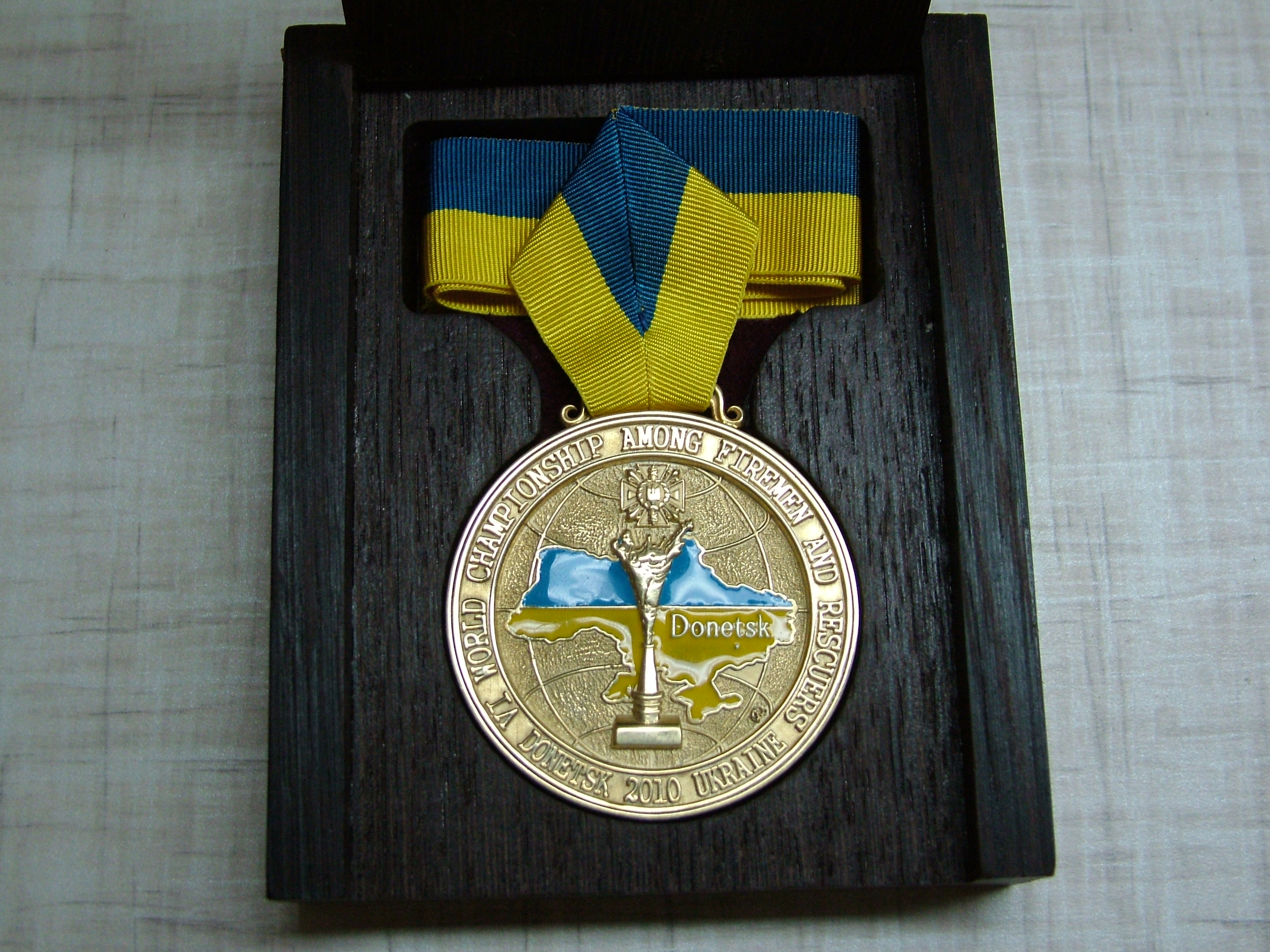 Нагороди для чемпіонату виготовлялись ювелірною фабрикою ZeltaDarbs на замовлення МНС України Для виготовлення нагород було використованне стерлінгове срібло 930 проби. Вага медалі складала 65 грамів всьго було виготовленно 192 медалі, загальною вагою 12500 грам. Нагорода для першого місця була виготовлена зі срібла вкритого 22 каратним золотом, для другого місця медаль була зроблена зі срібла, для третього місця, медаль виготовлялась з бронзи. Всі нагороди були оздоблені емаллю. Футляри для медалей були виготовленні з цінних елітних пород дерева, Венге для першого місця, Амарант для другого місця, Бук для третього місця.